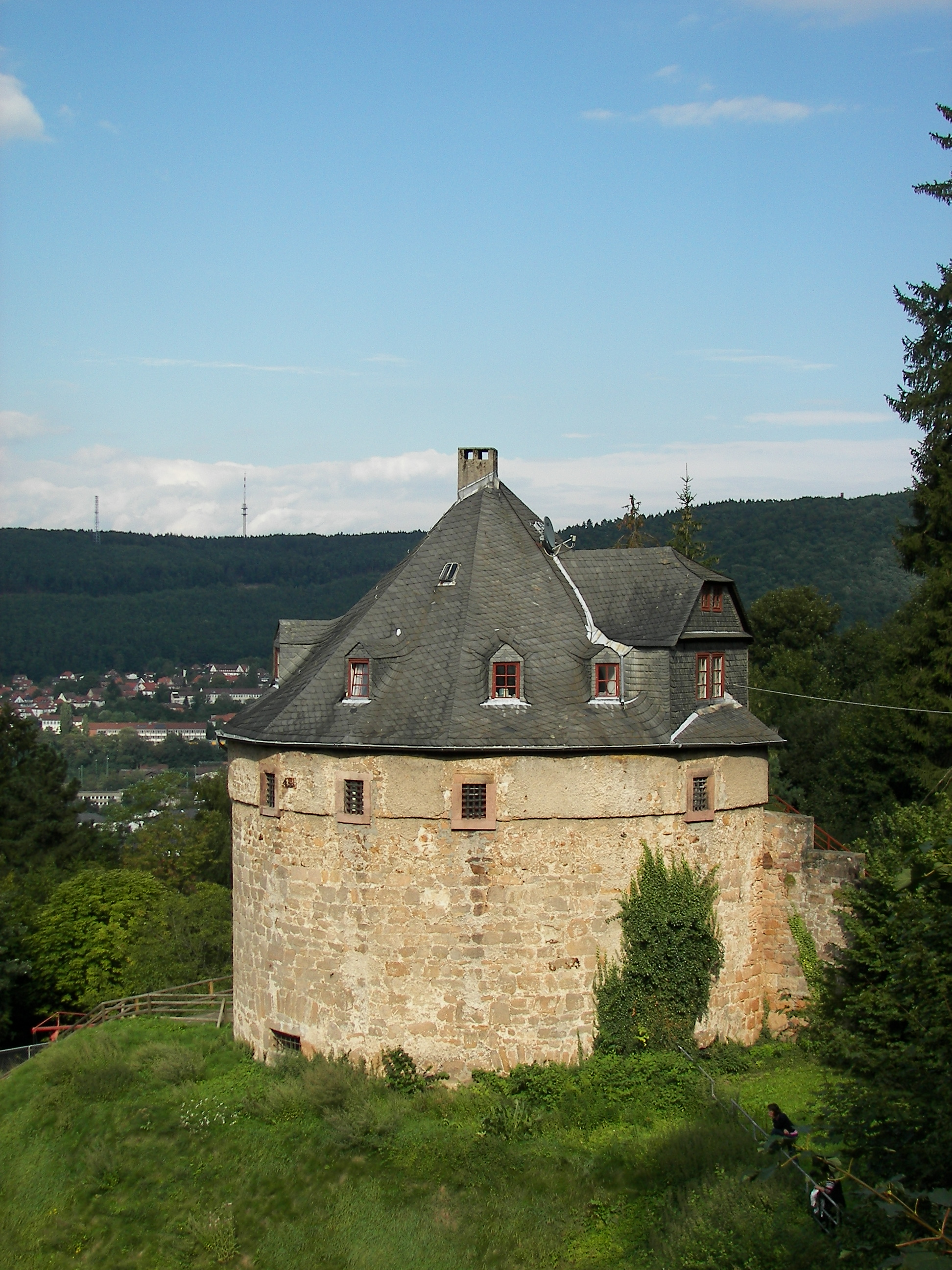 Marburger Schloss, Hexenturm